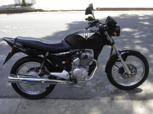 Motomel CG 150 Serie 2